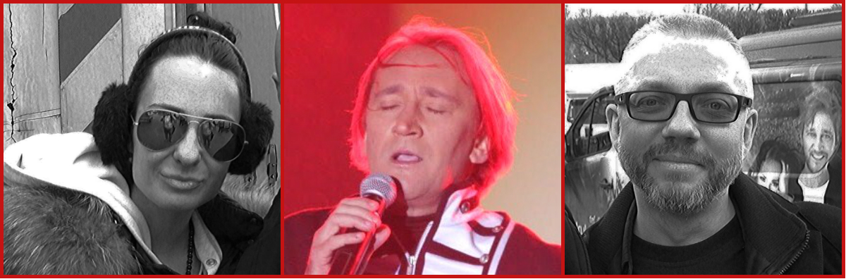 Ich Troje: Marta Milan, Michał Wiśniewski i Jacek Łągwa.